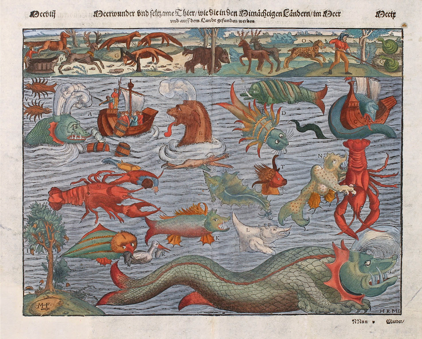 Meerwunder vnd seltzame Thier / wie die in den Mitnächtigen Ländern / im Meer vnd auff dem Landt gefunden werden (taken from the vignettes on Olaus Magnus's Carta marina), Basel c. 1544, 34 x 28 cm